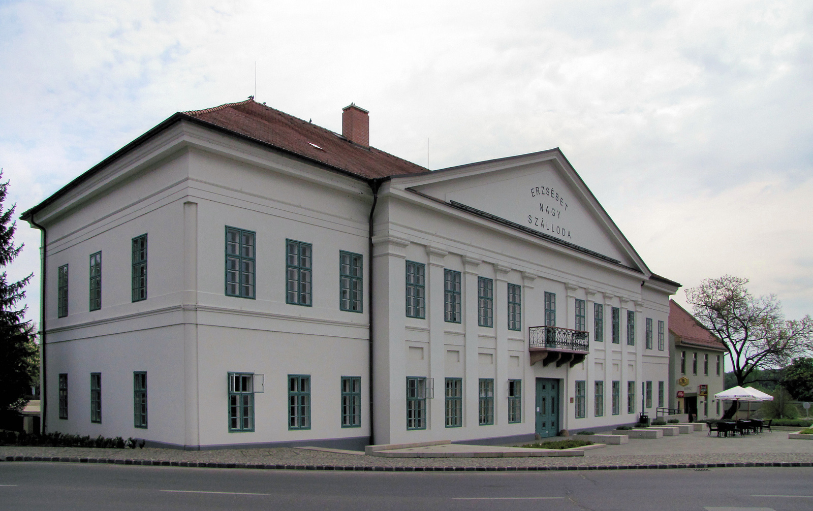 Erzsébet Szálló (Paks, Szent István tér 2.) This is a photo of a monument in Hungary. Identifier: 8706